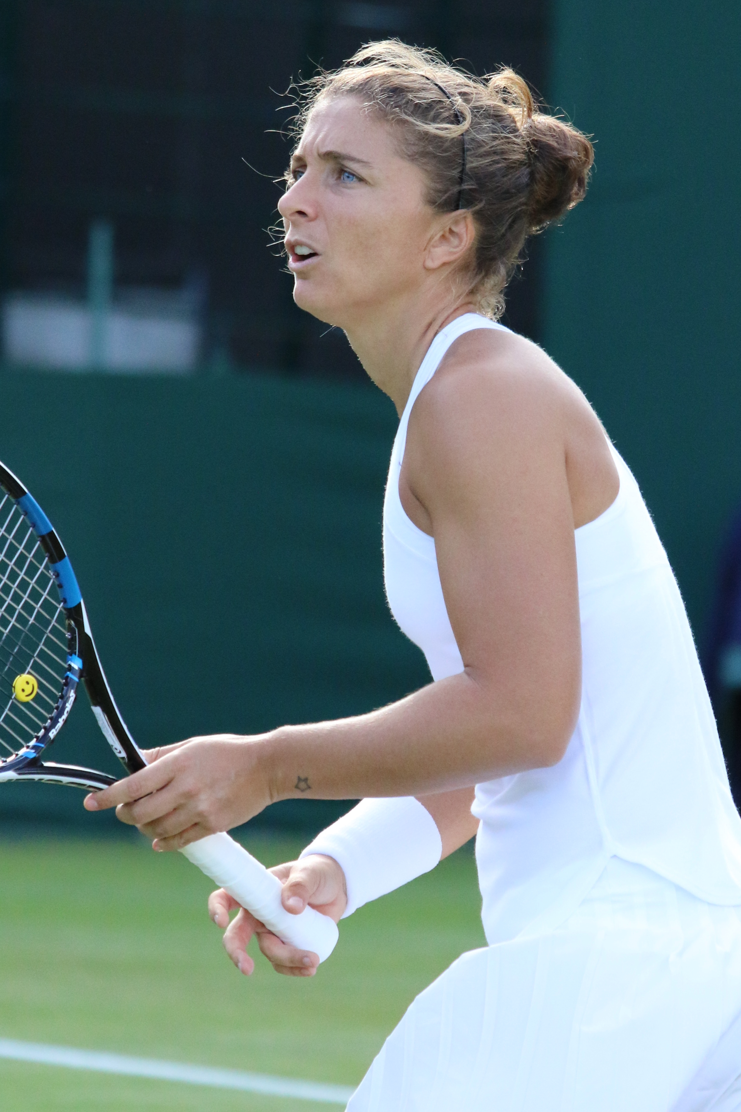 Errani WM16 (18)